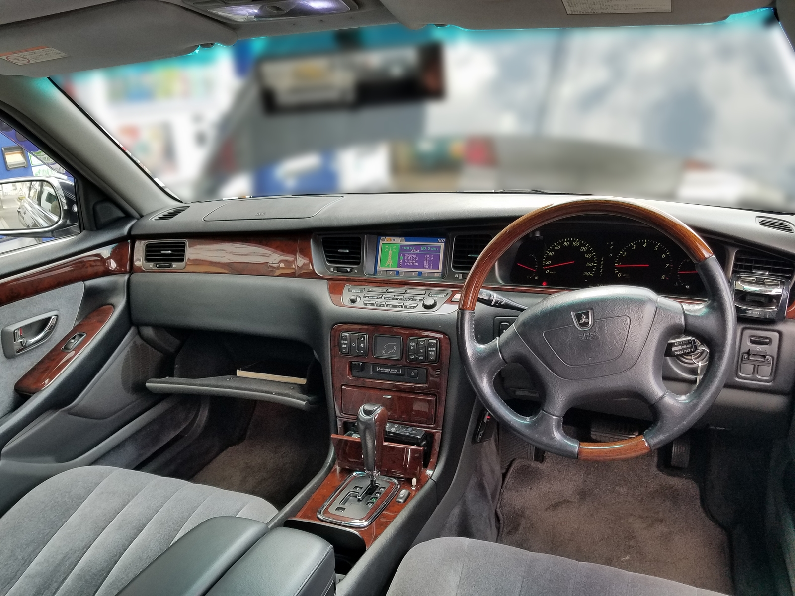 プラウディア B仕様